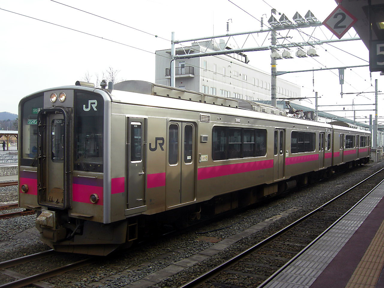 JR東日本701系電車0番台（秋田車両センター所属車）JR East 701-0(Akita)